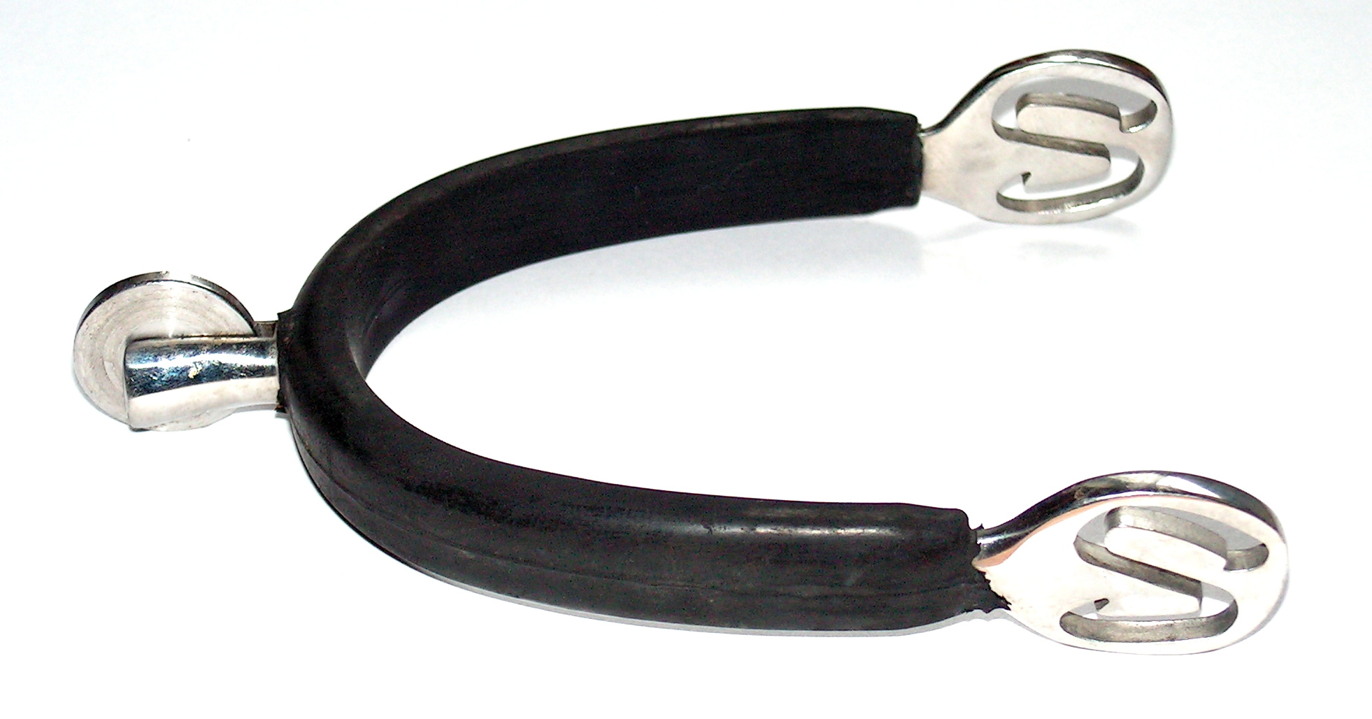 Eperon Pessoa avec une tige courte et une grosse molette lisse, particulièrement adapté au saut d'obstacles